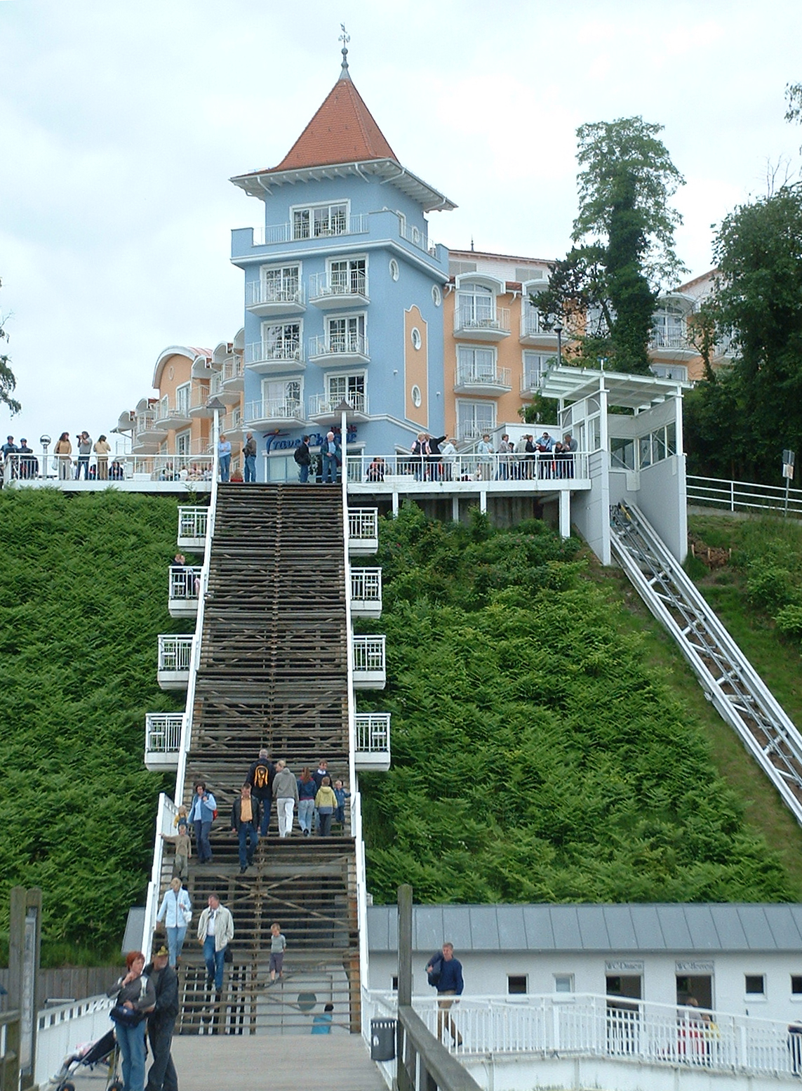 Ostseebad Sellin - 99-stufige, hölzerne Treppe zur Seebrücke (die so genannte Himmelsleiter oder Himmellleiter)